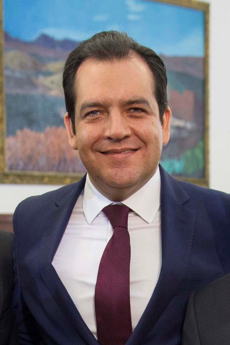 Roberto Albores Gleason, senador de México de 2012 a 2018